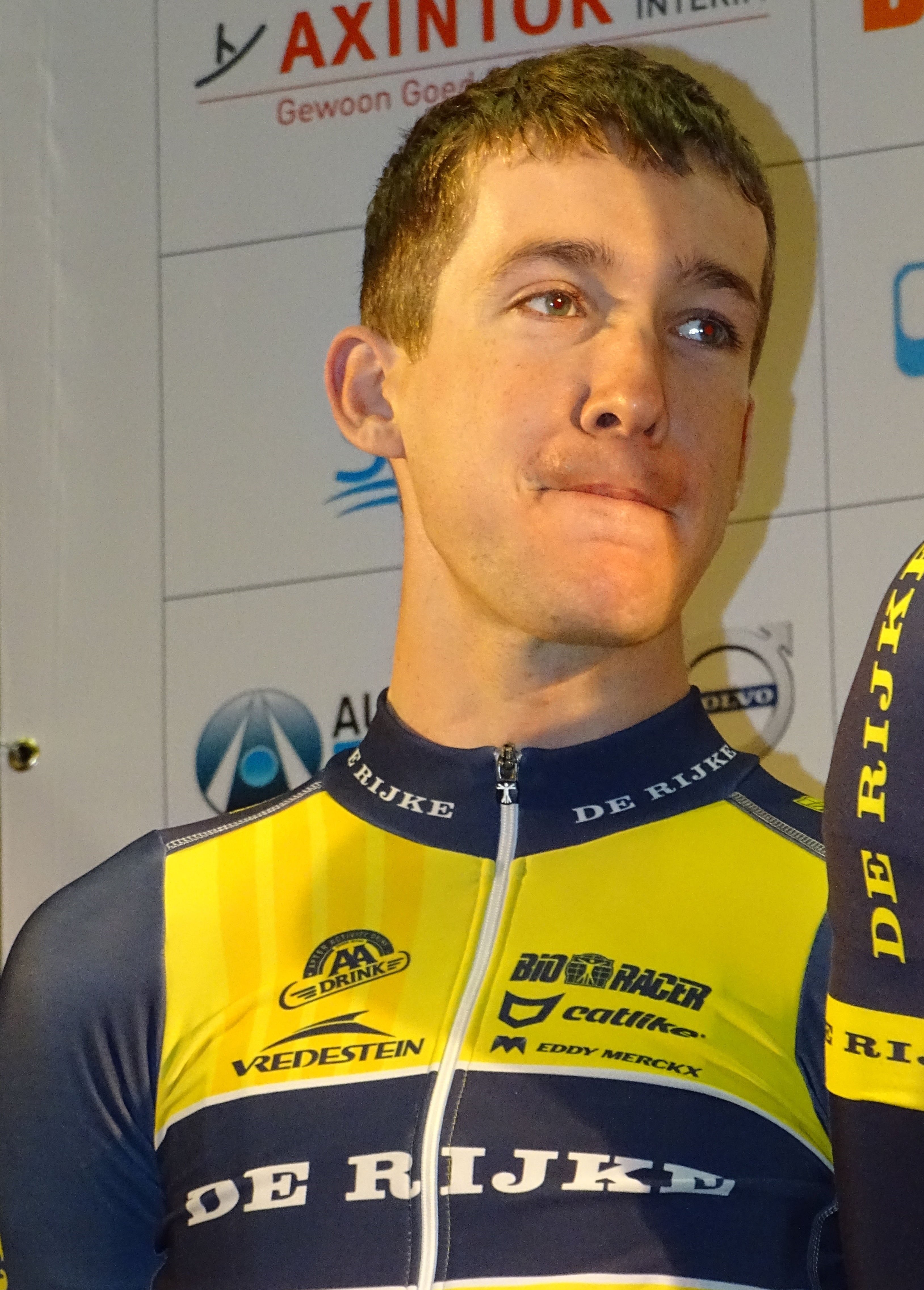 Reportage réalisé le vendredi 20 mars à l'occasion du départ de la Handzame Classic 2015 à Bredene, Belgique.